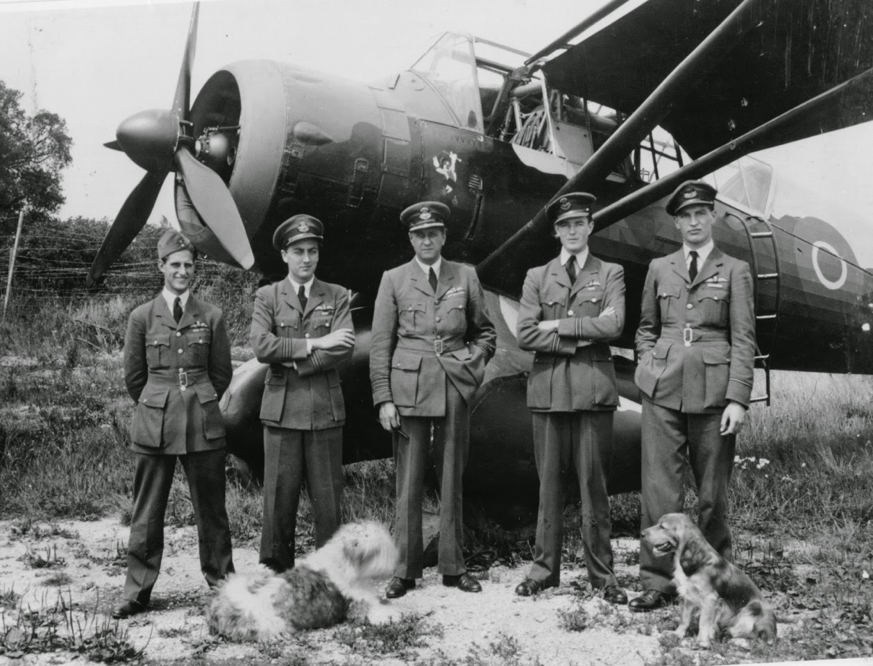 Le Groupe 161 de Tangmere en 1943 avec le Lysander de H.Verity . Musée de la Reddition .